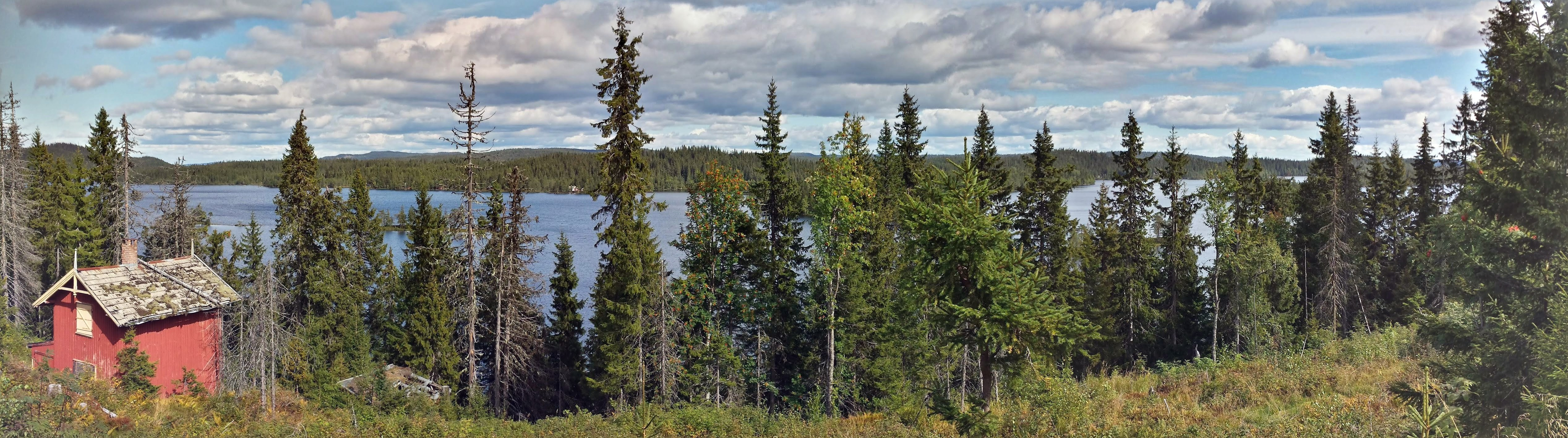 Øyangen er en innsjø som ligger ved Ringkollen på Krokskogen, i Ringerike kommune, Buskerud